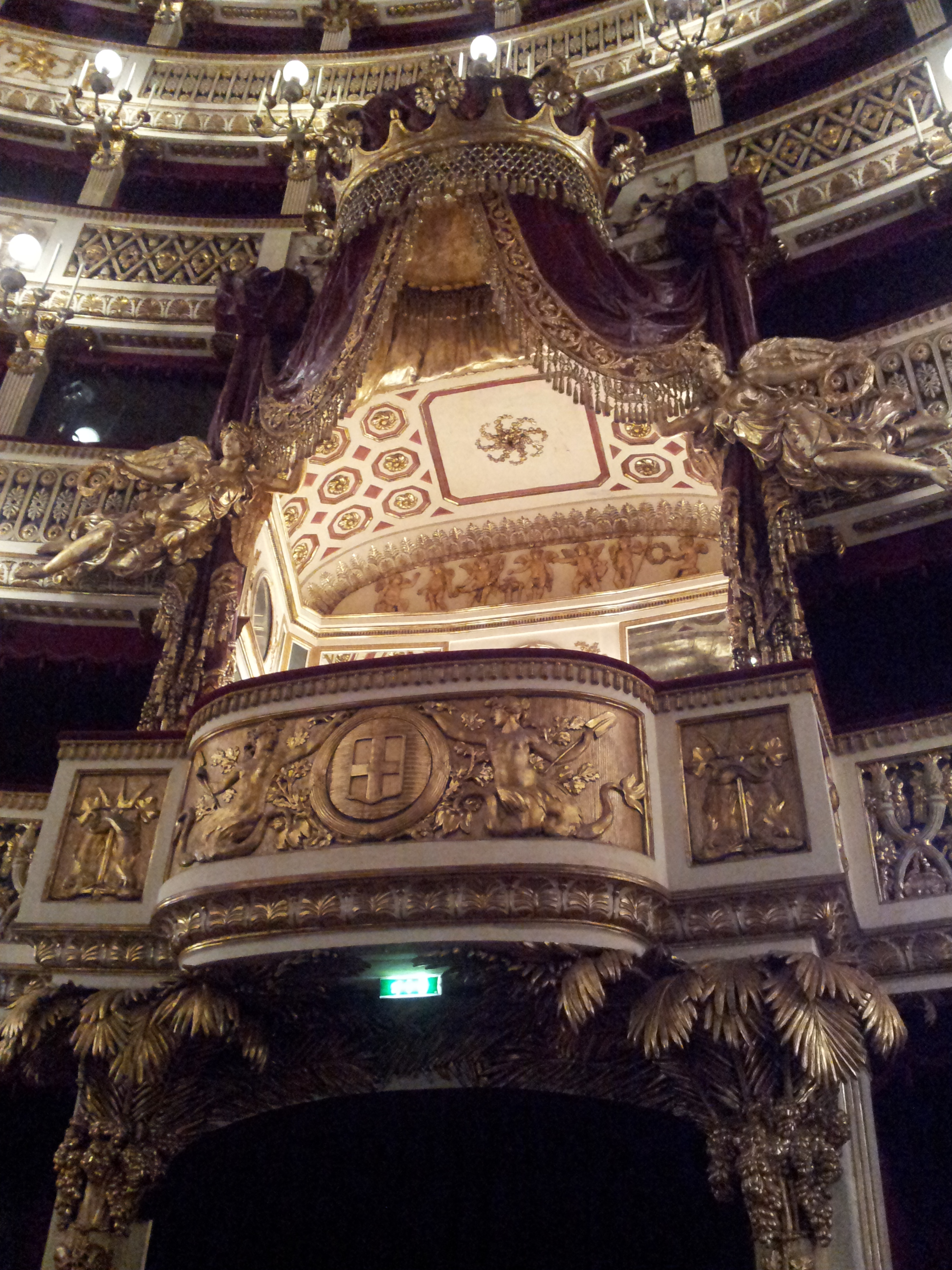 Particolare del palco reale del Real Teatro di San Carlo (Napoli). Lo stemma dei sabaudo fu aggiunto, con l'unità d'Italia, in sostituzione del preesistente stemma dei Borbone.